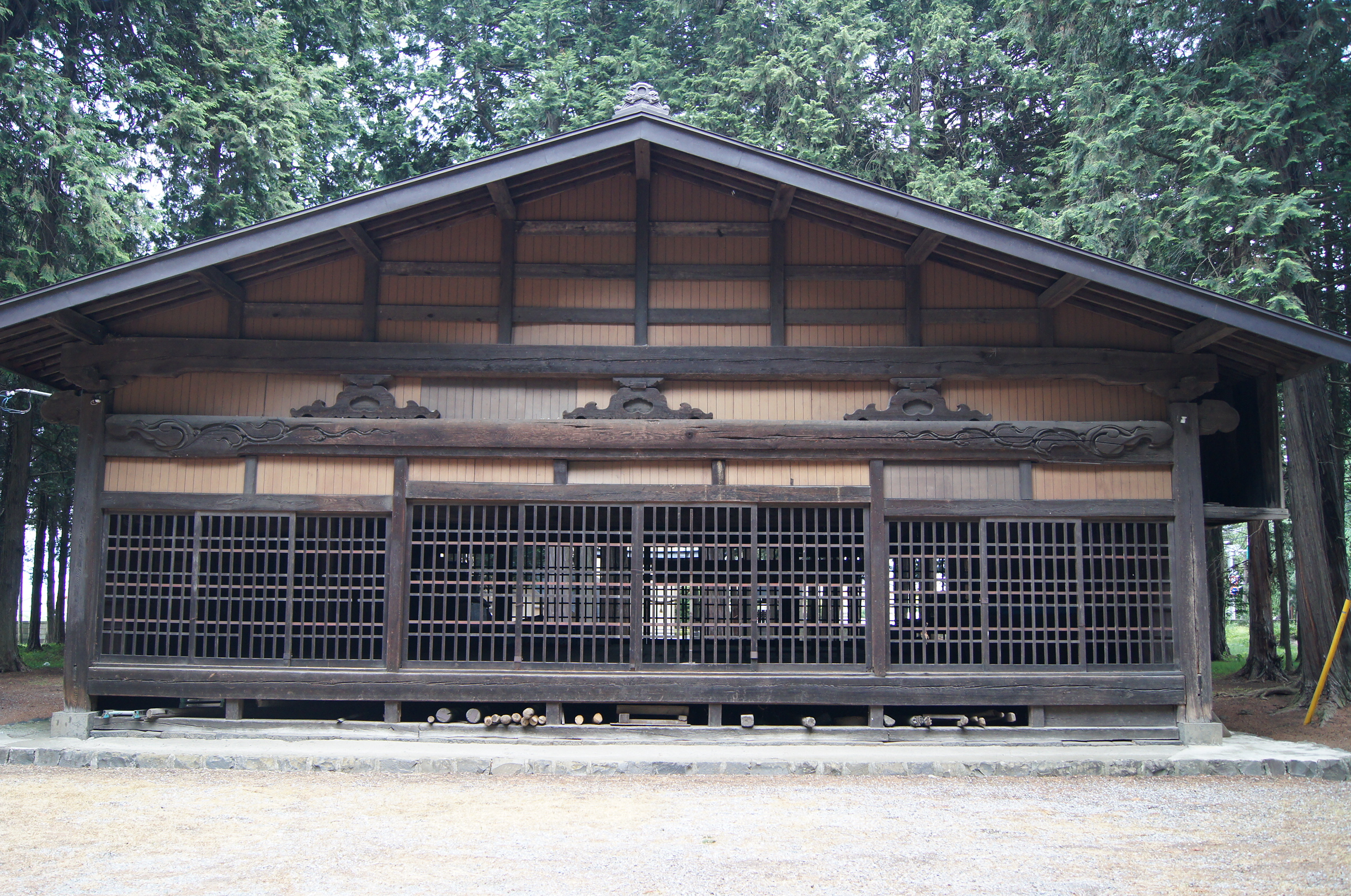 長野県松本市波田森口にある三神社の舞殿